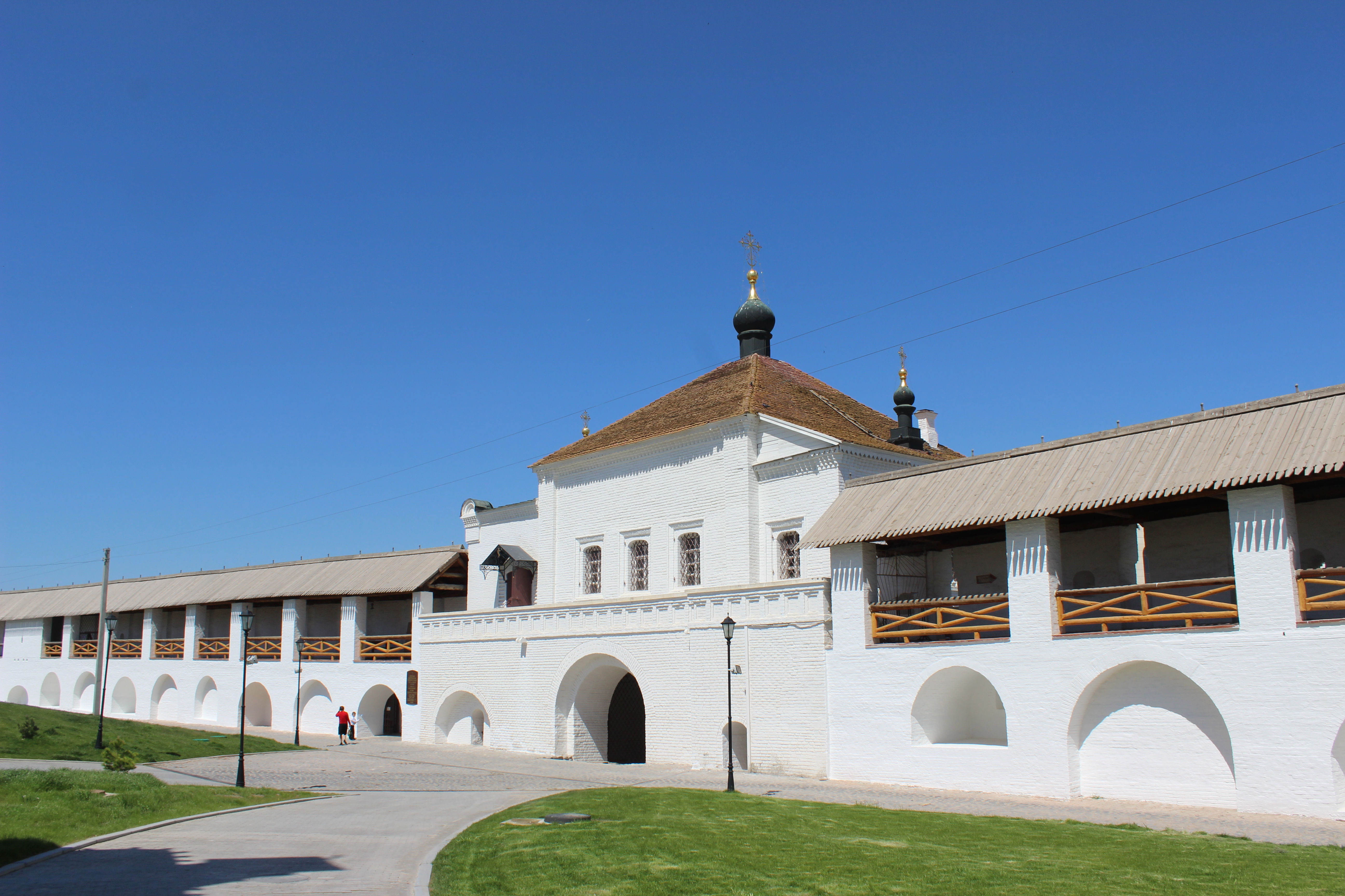 Церковь святителя Николая над Никольскими воротами: Астрахань, Астраханская область